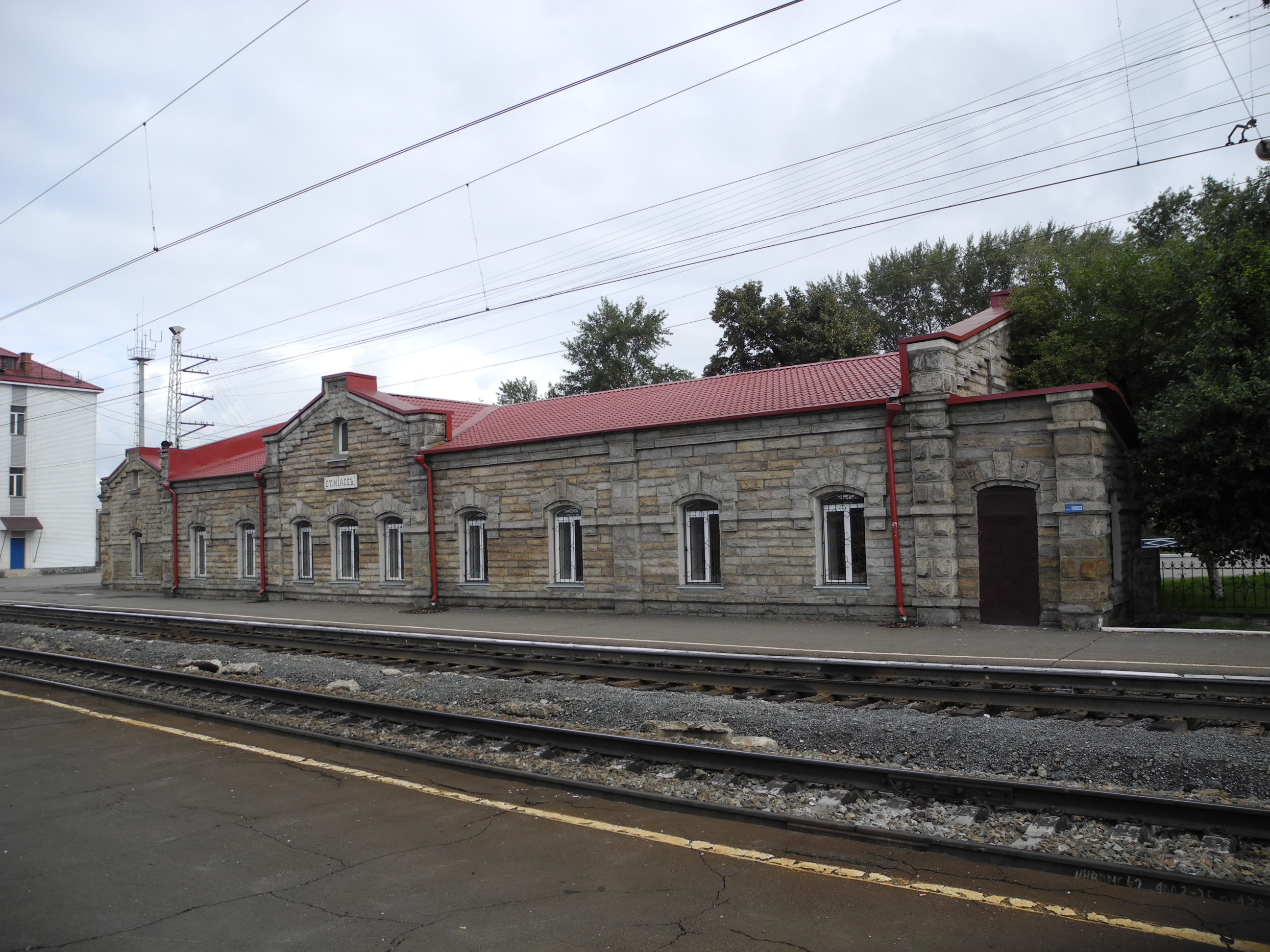 Вокзал железнодорожный станции Миасс-1 (Челябинская область, Миасс, ст. Миасс-1)